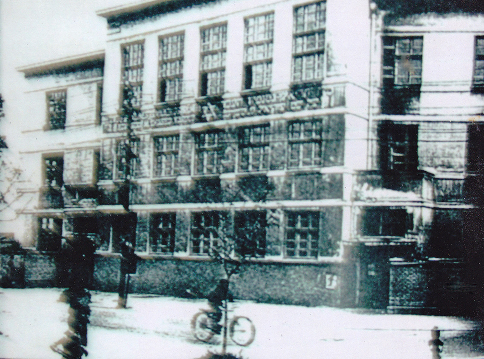 הבניין החדש ע"ש צ'ייס